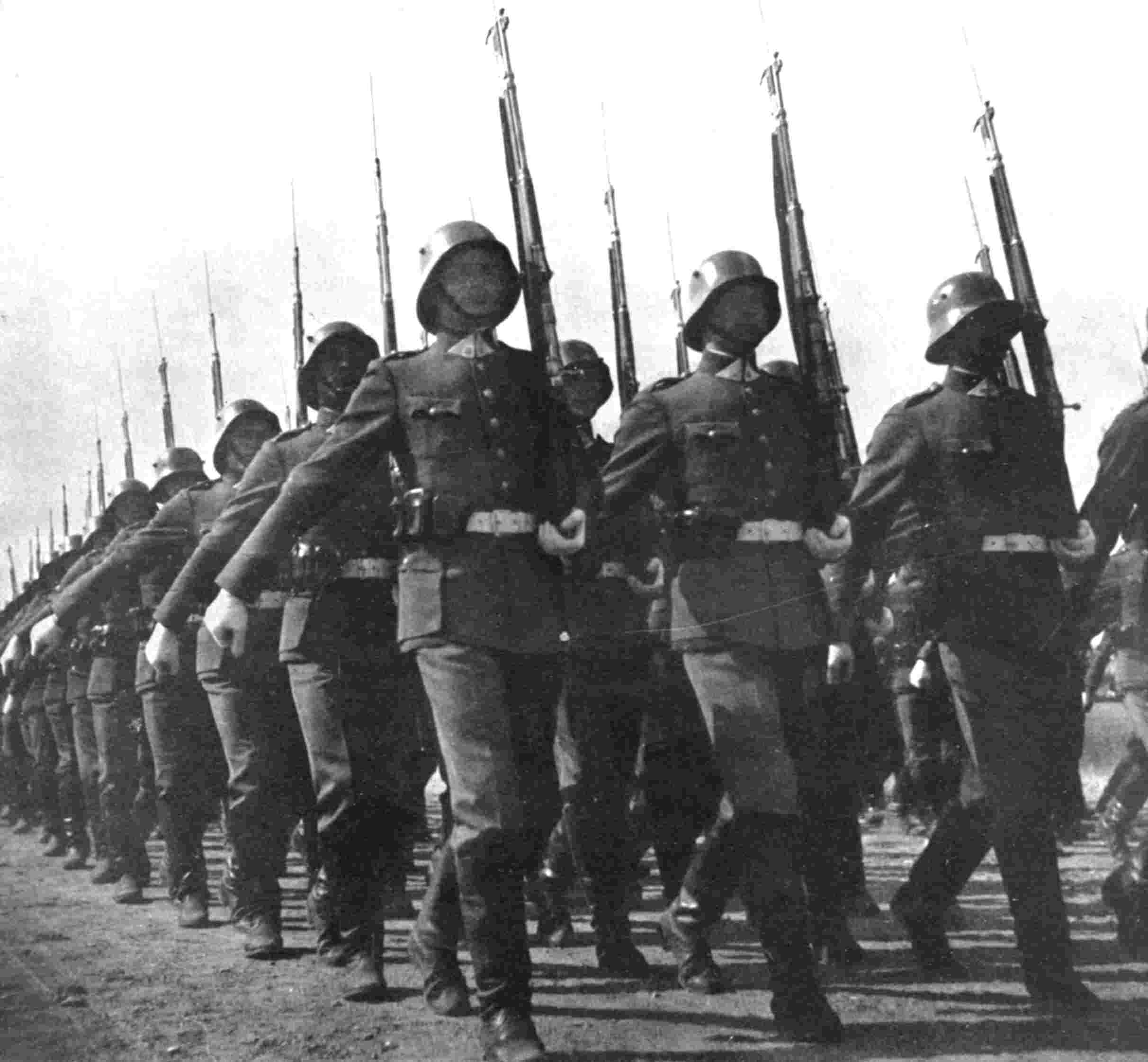 Lietuvos kariuomenė, 1938. Army of Lithuania in 1938